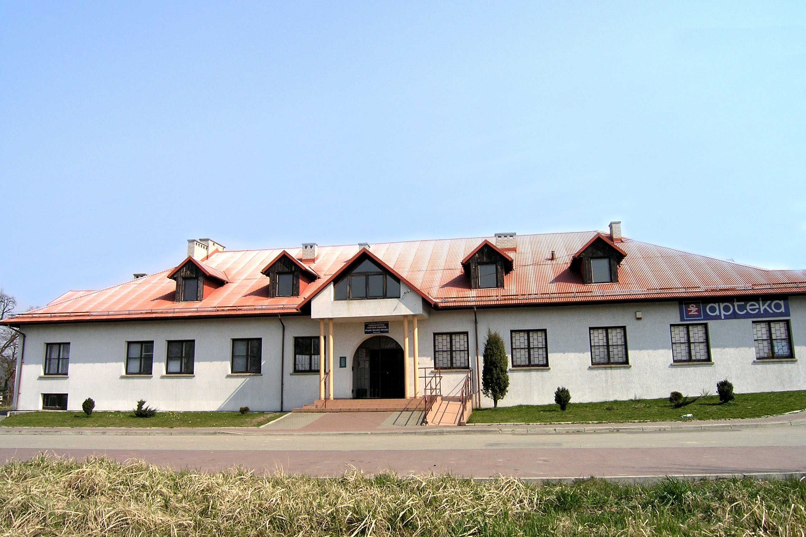 Wiejski Ośrodek Zdrowia w Tenczynku